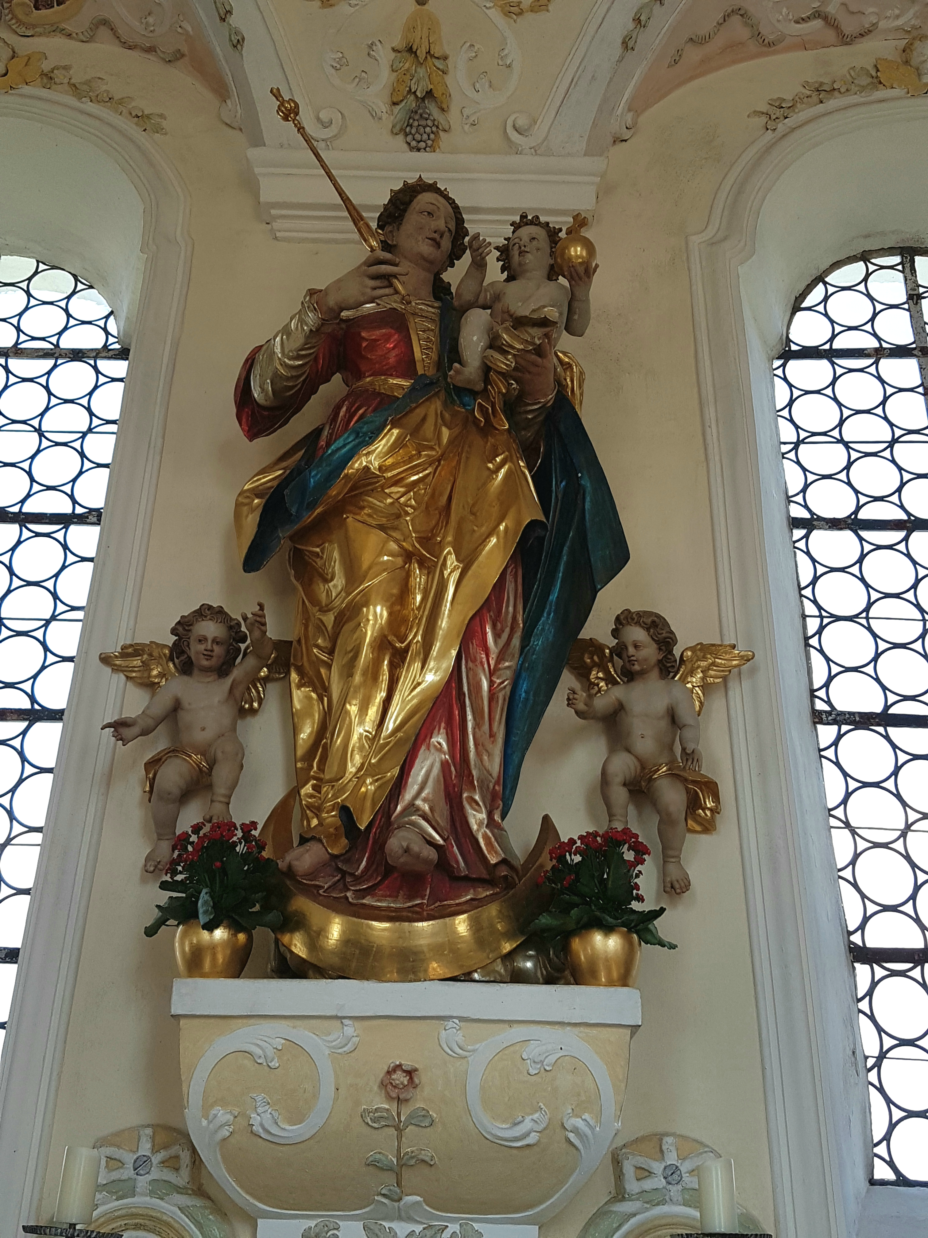 Hofheim (Spatzenhausen), St. Johannes Evangelist, Marienfigur von Hans Degler.